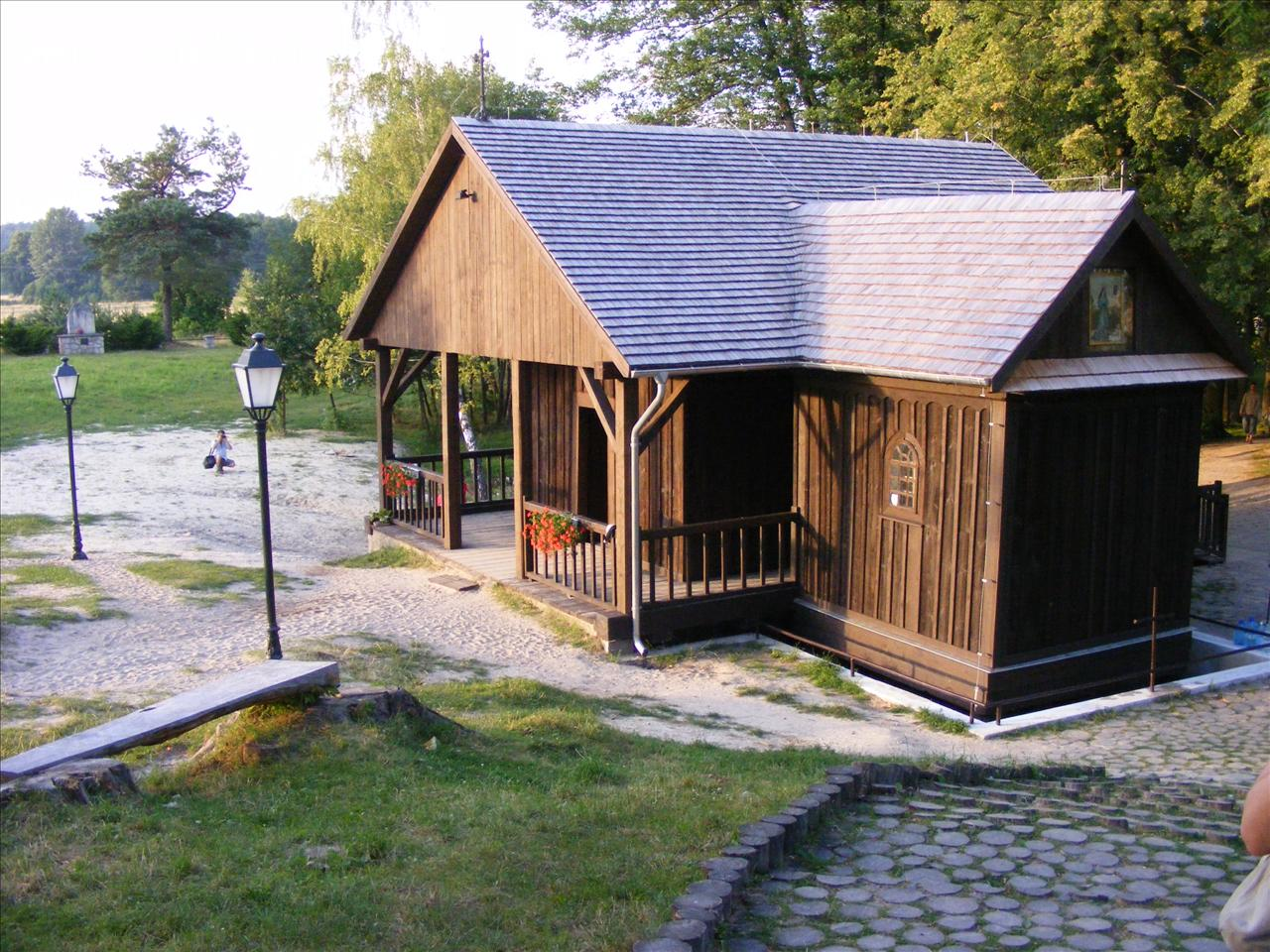 Cudowne źródła mają moc leczniczą